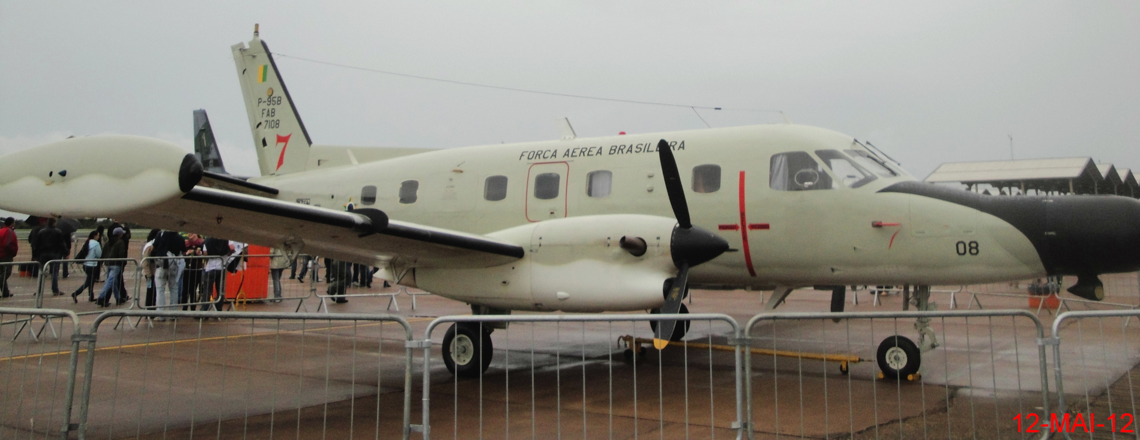 Esquadrilha da Fumaça 60 anos - Pirassununga - Embraer EMB-111 Bandeirante Patrulha, apelidado de "Bandeirulha", este avião é utilizado em patrulha marítima